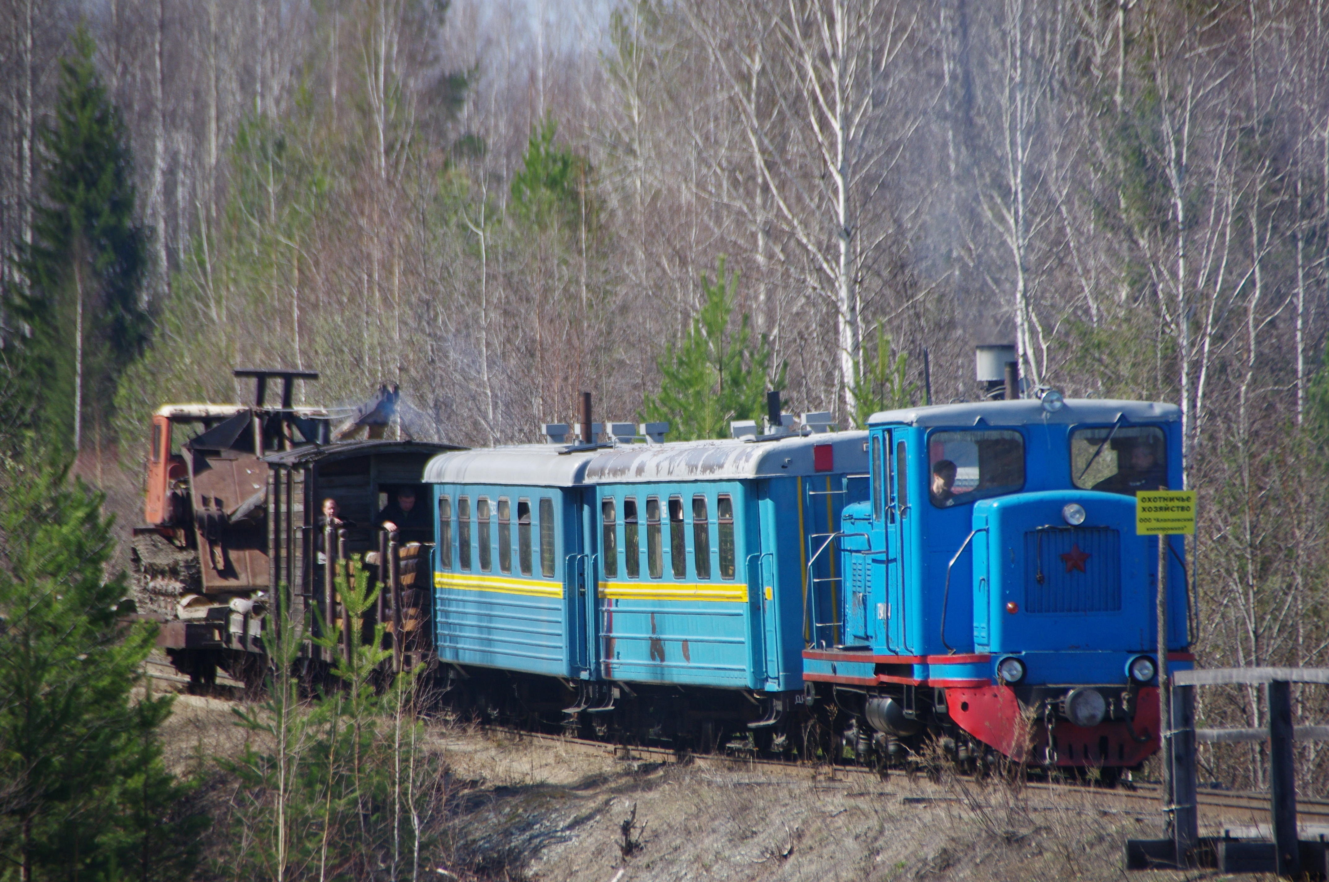 Экскурсионный поезд Алапаевск - Санкино. 2-3 мая 2014 г. Организован проектом "Поезд Напрокат".